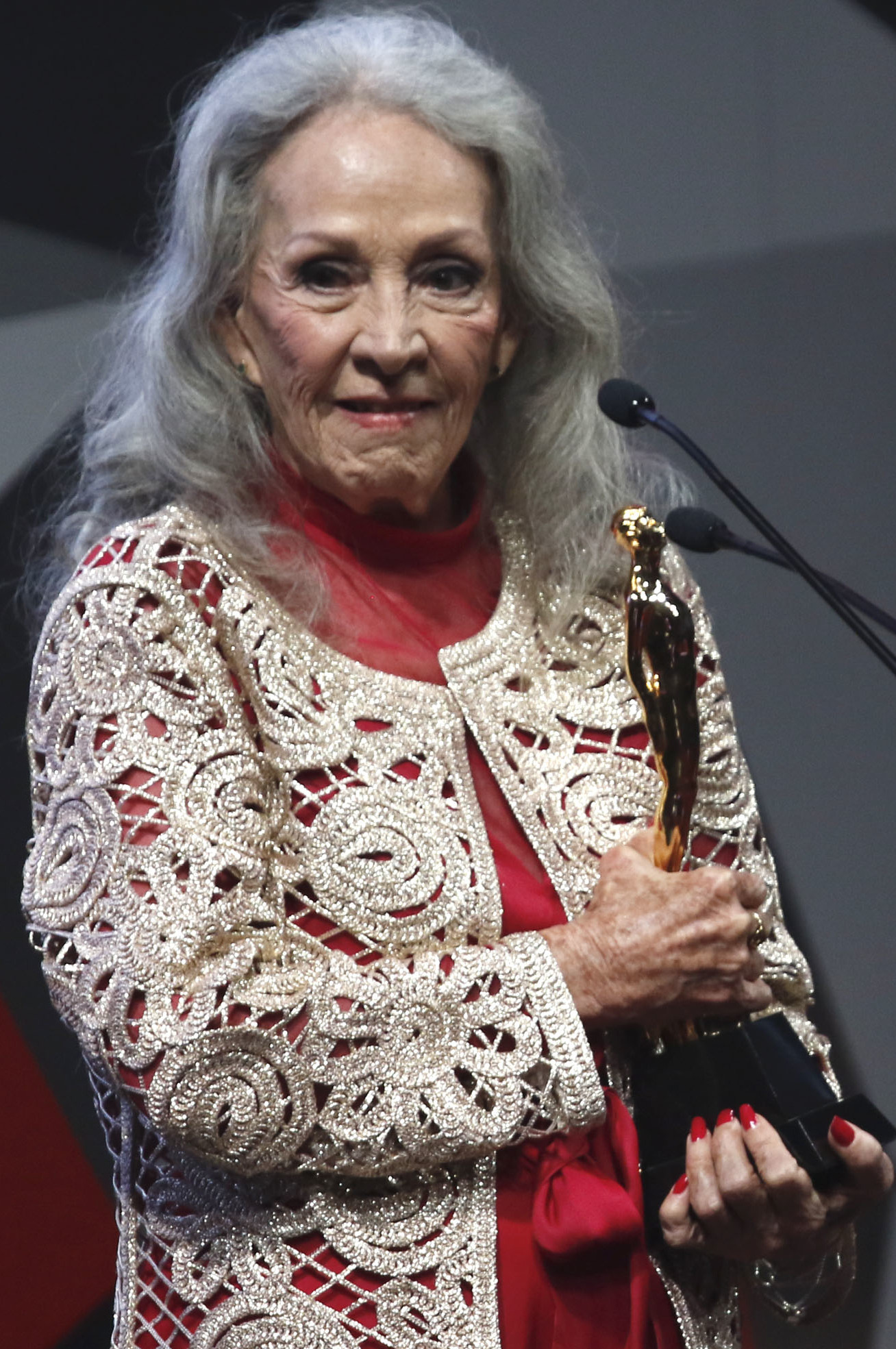 Martes 11 de julio de 2017. En el Palacio de Bellas Artes, se realizó la ceremonia número 59 de la entrega de Premios de la Academia Mexicana de Cinematografía, Ariel. Encabezado por su presienta la actriz Dolores Heredia. ARIEL DE ORO, Actriz Isela Vega. Fotografía: Milton Martínez / Secretaría de Cultura CDMX.